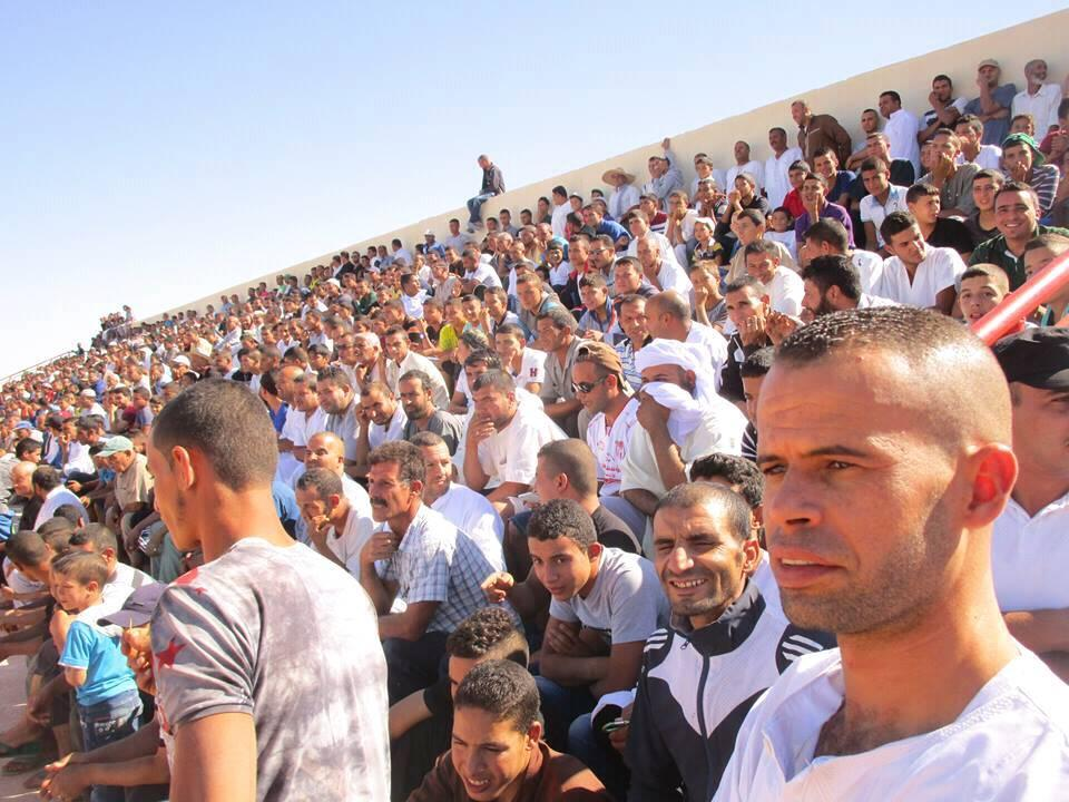 صورة لجماهير نادي اتحاد الدوسن